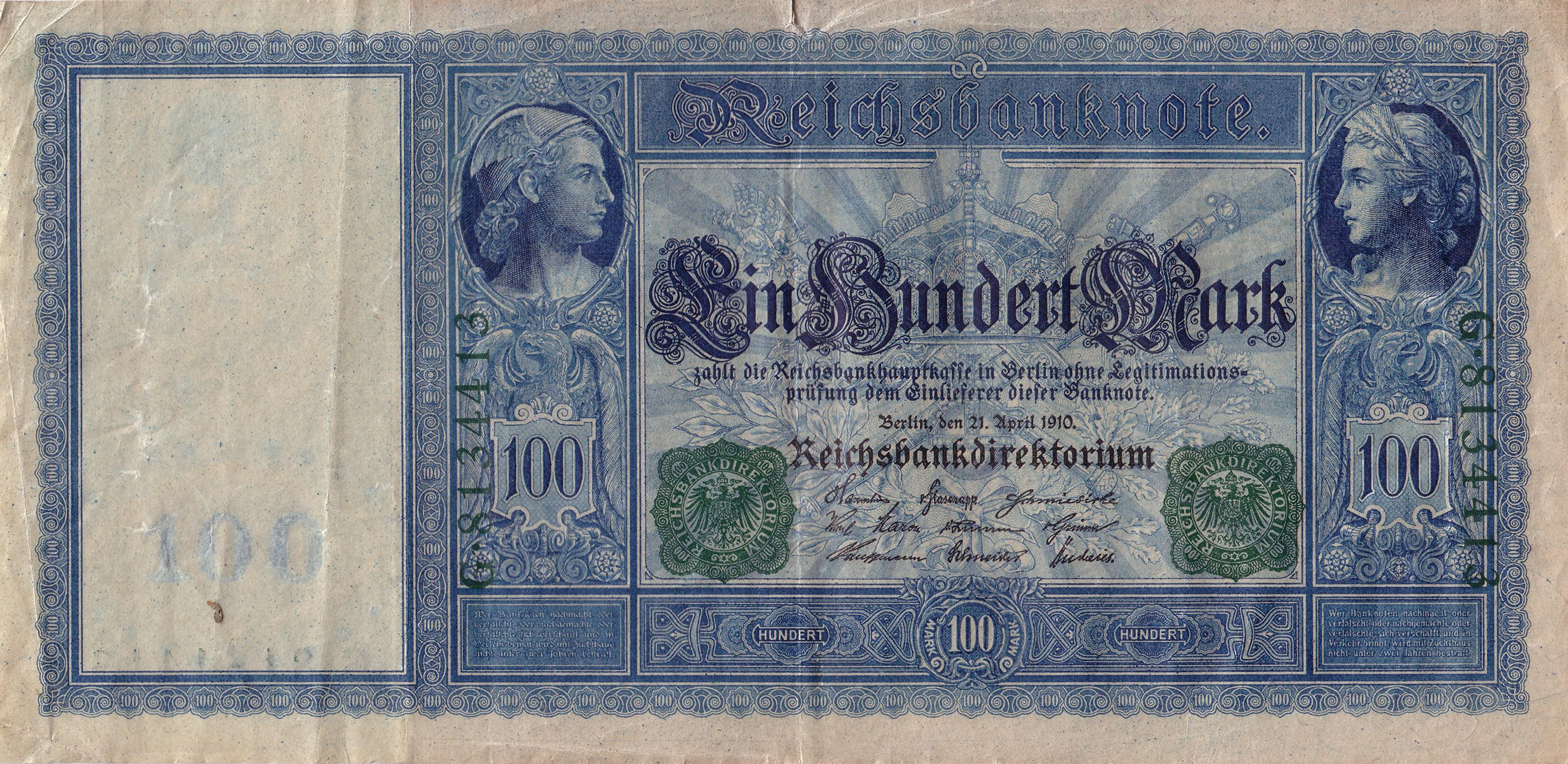 Ein Hundert Goldmark mit grünen Siegel (Nachkriegsausgabe)